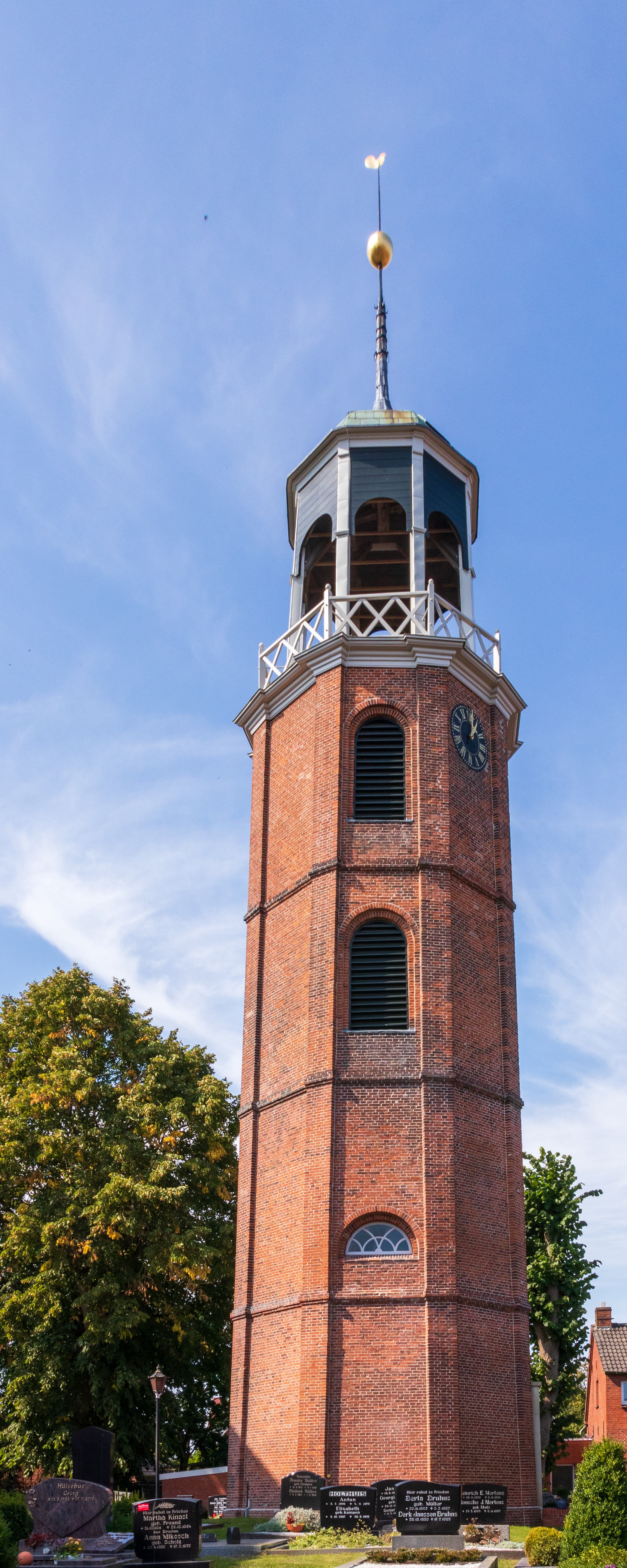 Ev. Rev. Kirche Ditzum. mit: Kirchhof, Grabsteine; Einschiffiger, romanischer Backsteinbau mit hochsitzenden Fenstern auf der Nordseite. Drei kräftig abgetreppte Rundbogenportale später vermauert. Erbaut frühes 13. Jahrhundert. Bedeutung: historisch, künstlerisch, wissenschaftlich, städtebaulich; wesentliche Begründung: 1.05 geschichtliche Bedeutung aufgrund des Zeugnis- und Schauwertes für Bau- und Kunstgeschichte; Einzeldenkmal gemäß § 3.2 NDSchG; in Gruppe baulicher Anlagen: 457012Gr0016